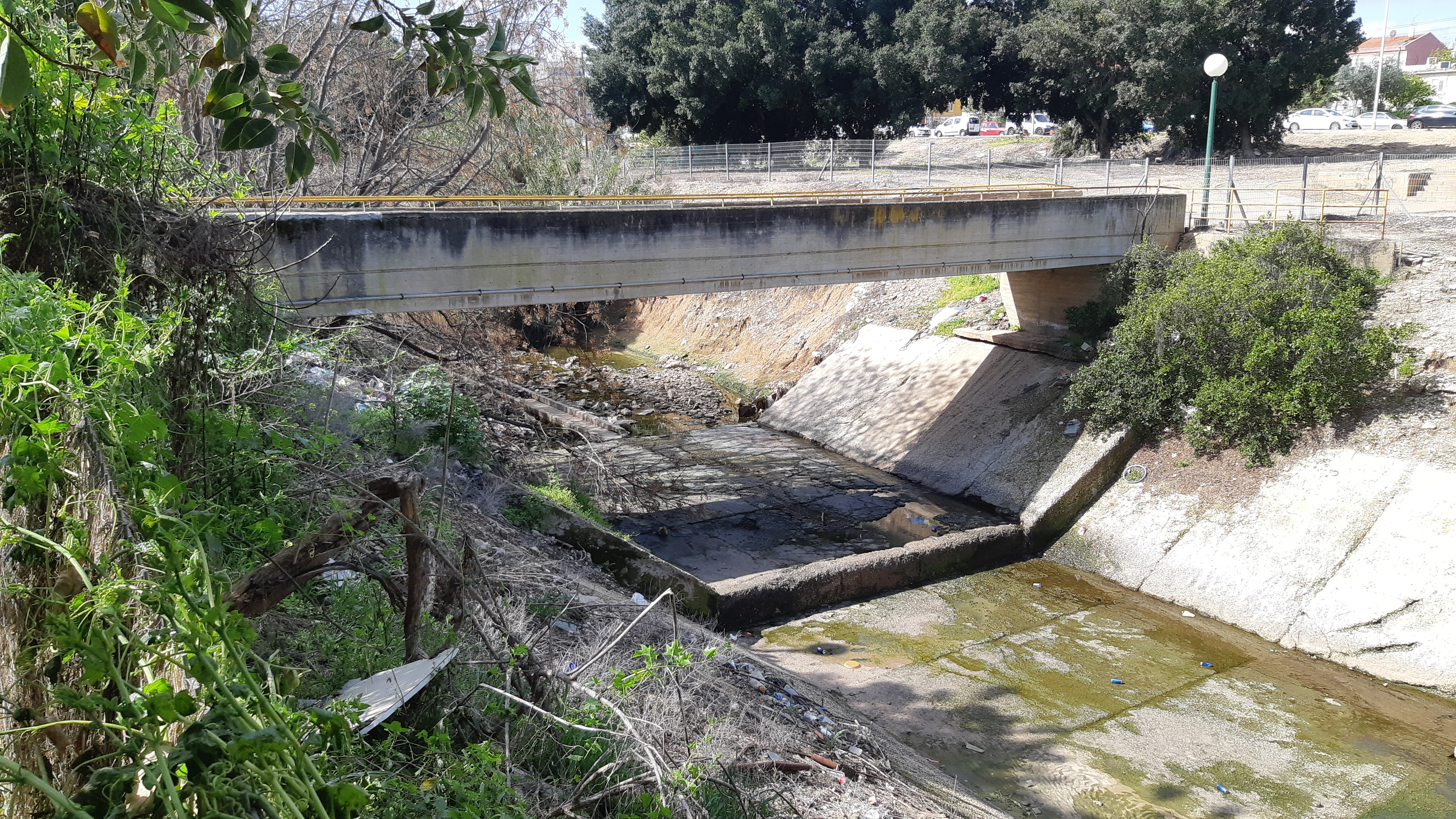 גשר השלושה - קרית גת